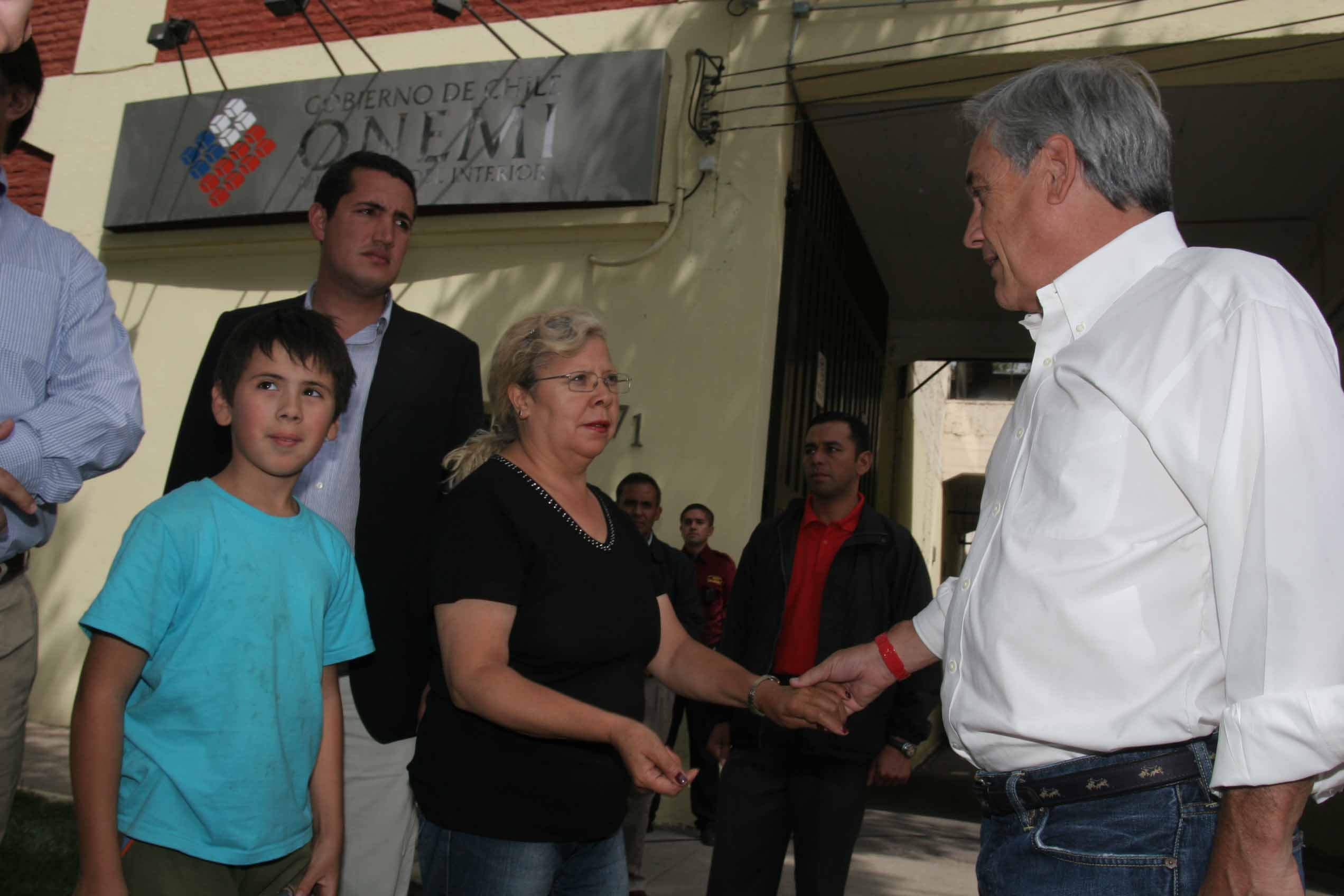 Sebastián Piñera, en la Oficina Nacional de Emergencias del Ministerio del Interior.